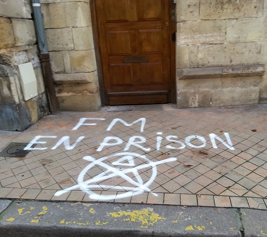 Le 13 janvier 2014, des tags antimaçonniques sont apposés devant le temple de la rue Ségalier à Bordeaux, datant de 1732 et rénové en 1981.